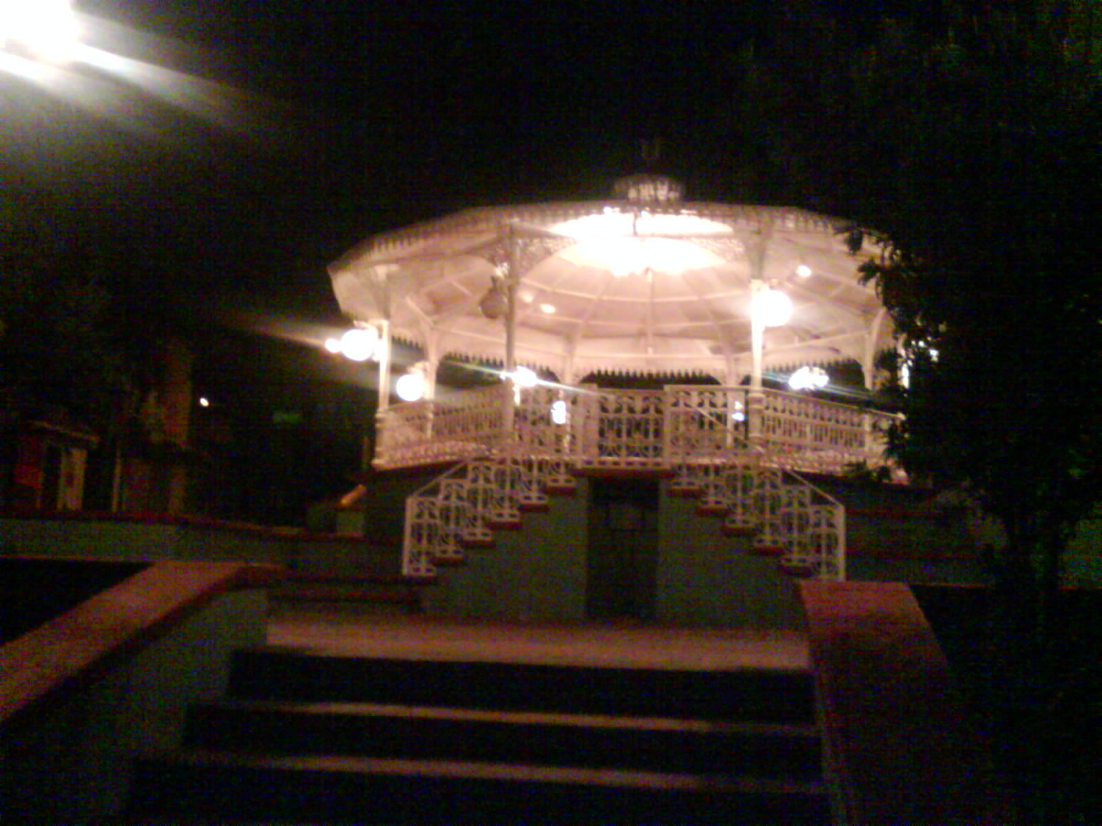 Kiosko. Santiario, Cardonal. Hgo